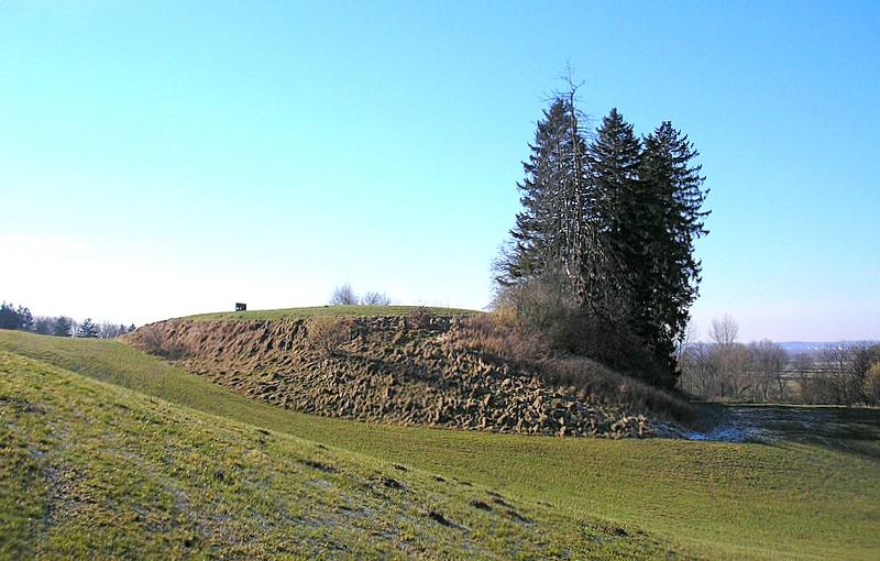 Burgstall Miedering (Gemeinde Affing, Landkreis Aichach-Friedberg, Bayerisch Schwaben). Ansicht von Osten. Eigene Aufnahme, Feb. 2008 / Former Miedering castle near Affing (Bavaria, Germany). View from the east. Own photo, Feb. 2008